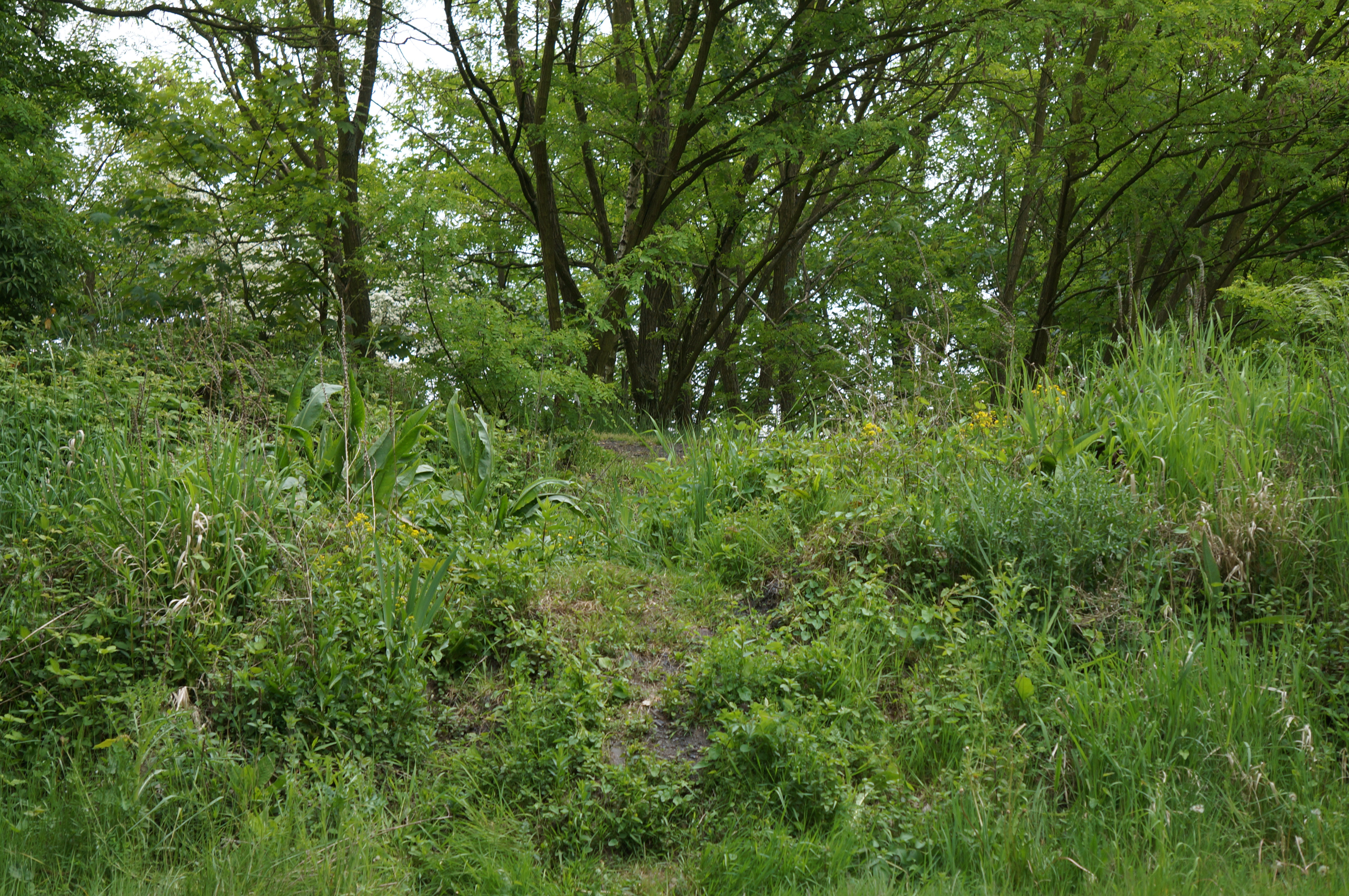 Réserve naturelle régionale des Annelles, Lains et Pont Pinnet Nord-Pas-de-Calais-Picardie